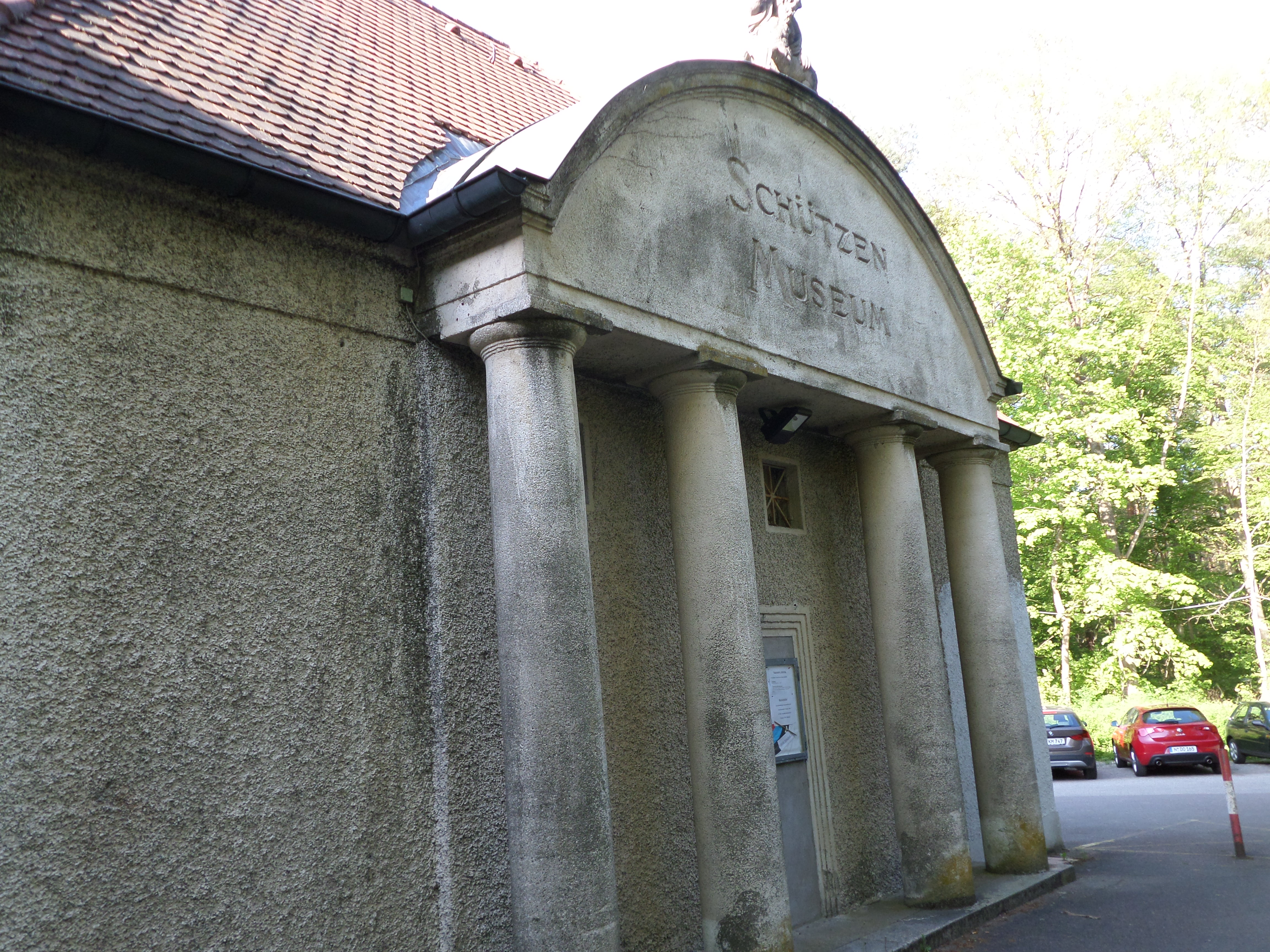 Günthersbühler Straße 145 - Schützenhaus Erlenstegen - Weitläufiger Gruppenbau mit Schützenhaus, Schützenmuseum und Gasthaus, ein- und zweigeschossige Putzbauten mit Walm- und Satteldächern, Rundturm und Risaliten, Jugendstil, von Hans Müller, bez. 1910–11 - Ausschank, erdgeschossiger Putzbau mit Satteldach, querstehendem Anbau und hölzerner Vorhalle, Jugendstil, gleichzeitig - Reste der Einfriedung, Torpfeiler und Torbogen, in Jugendstilformen, gleichzeitig. - D-5-64-000-689